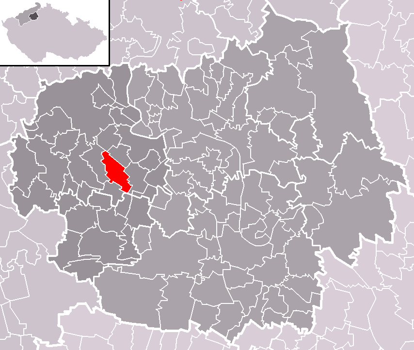 Poloha obce Čížkovice v rámci okresu Litoměřice a správního obvodu obce s rozšířenou působností Lovosice. Location of Čížkovice municipality within Litoměřice District and administrative area of Lovosice as a Municipality with Extended Competence.